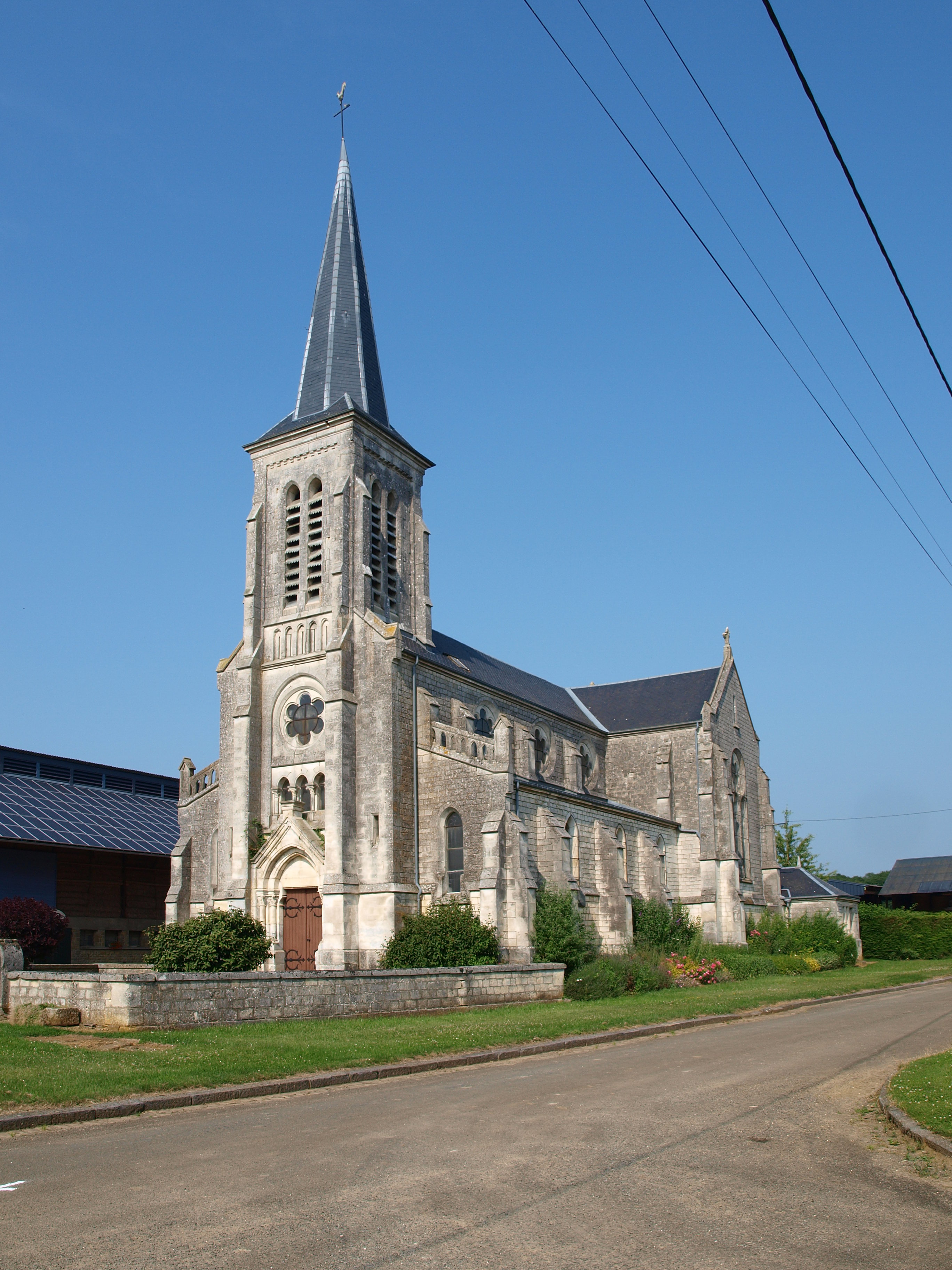 Artaise-le-Vivier (Ardennes, France) ; ; Artaise ; l'église.